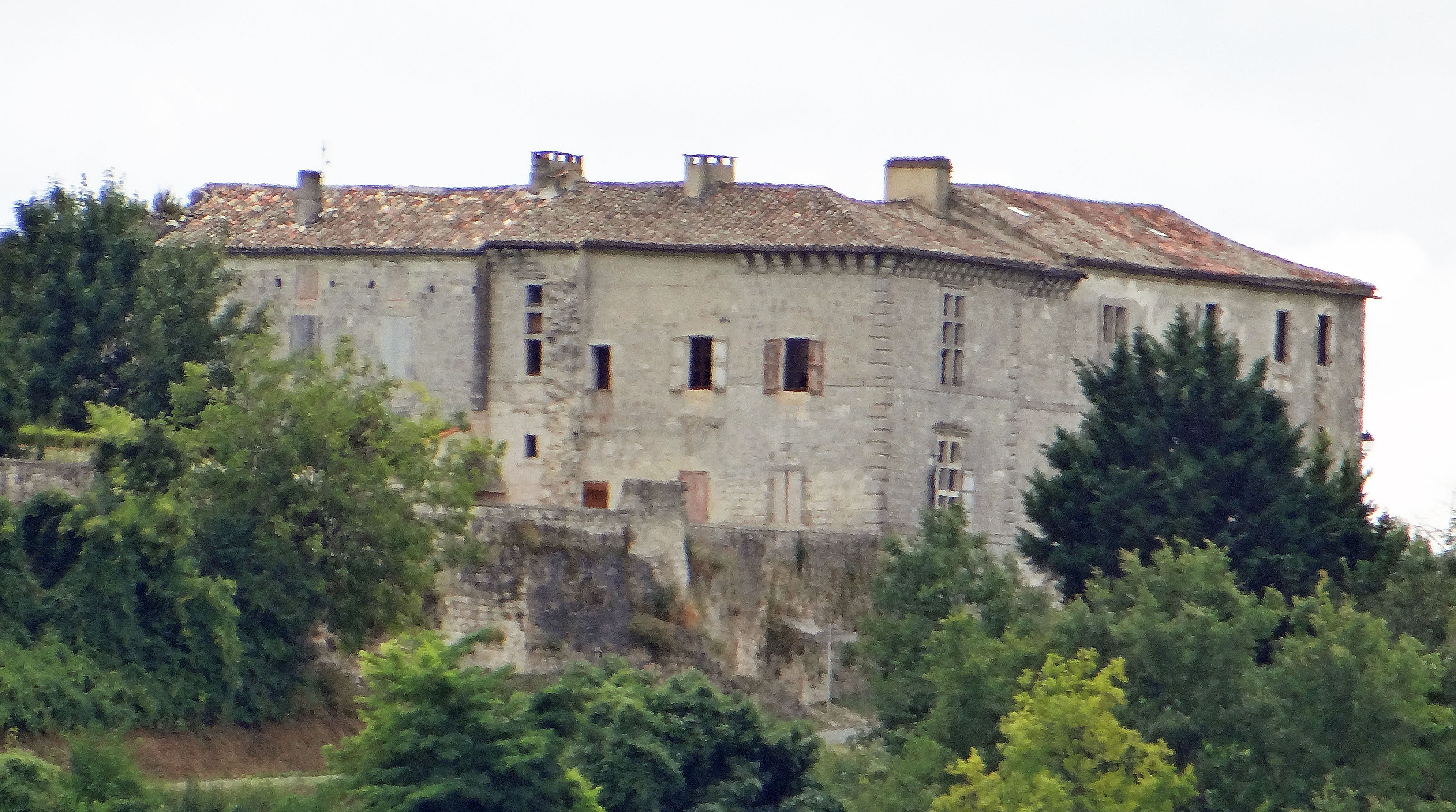 Château de Beauville - Côté campagne